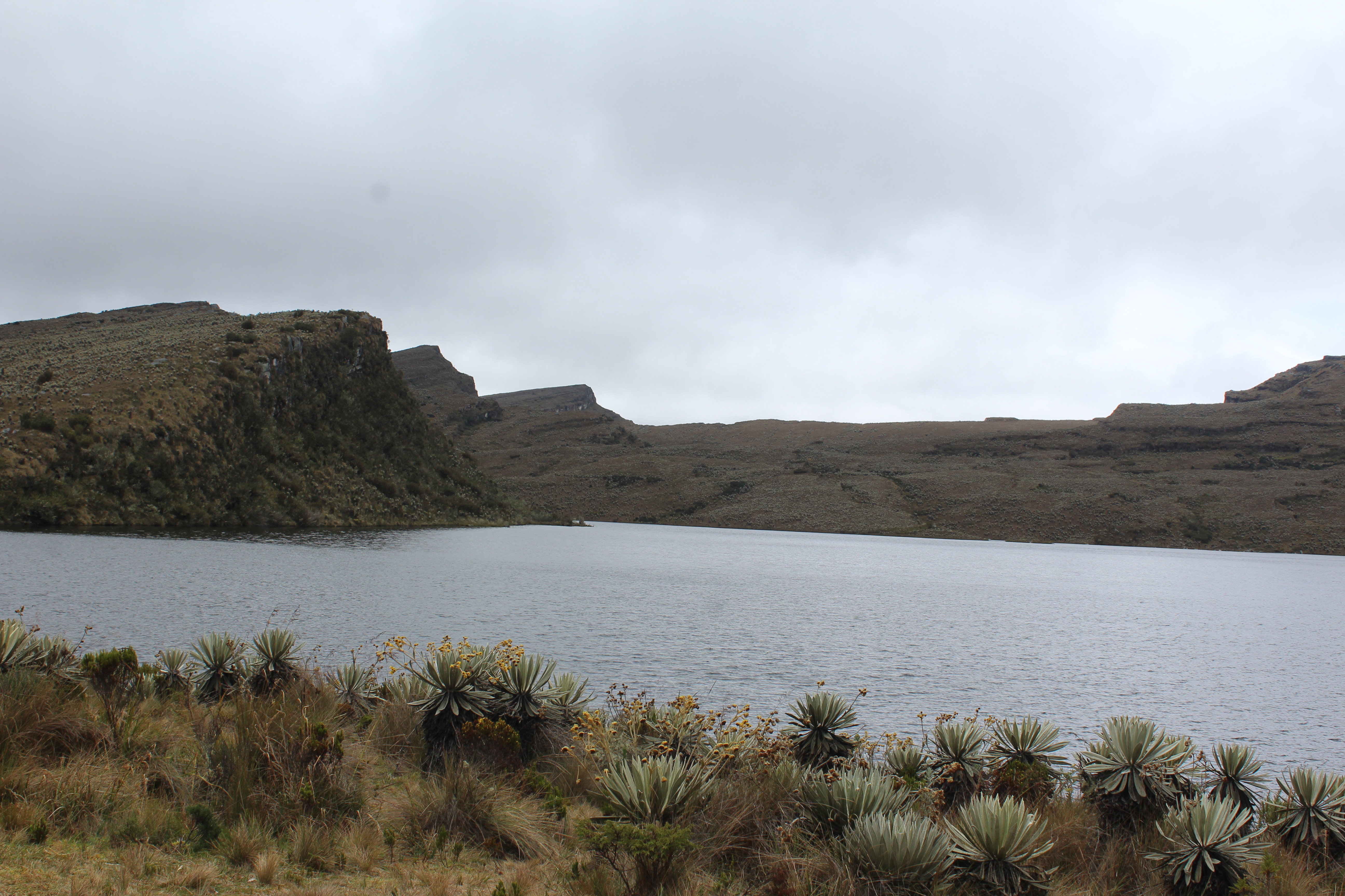 Laguna los tunjos Páramo de Sumapaz, Colombia Esta fotografía fue tomada en un área protegida de Colombia con el código 11001 del RUNAP.